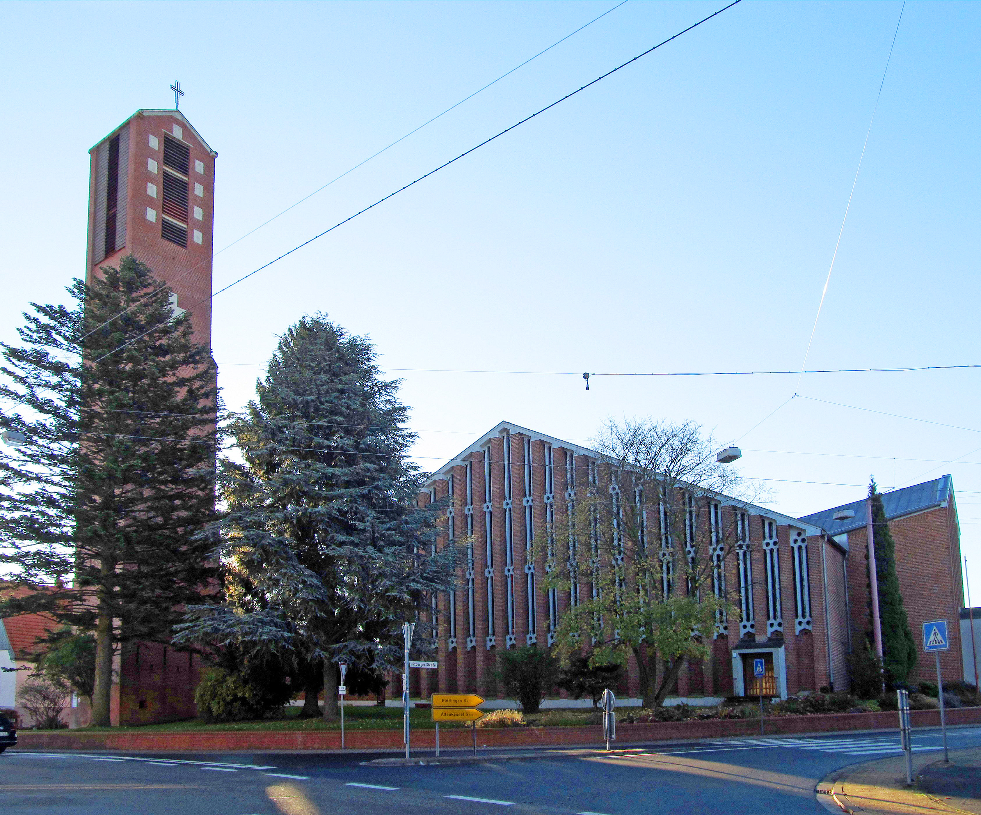 Die katholische Pfarrkirche St. Matthias in Riegelsberg, Saarland